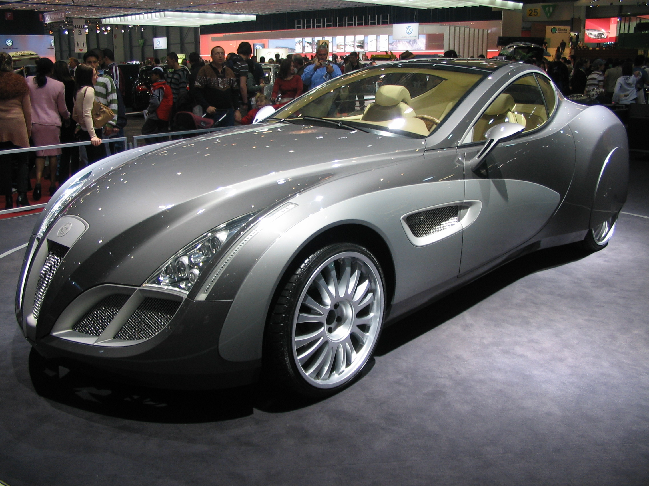 Coupé rétro Russo-Baltique Impression, salon de Genève 2007 -- développé en partenariat avec l'allemand Gerg GmbH, l'ancienne firme lettone spécialisée dans l'automobile de luxe, renait au milieu des années 2000 avec ce véhicule inspiré des années 1930; moteur V12 biturbo 6l AMG (CL 65).